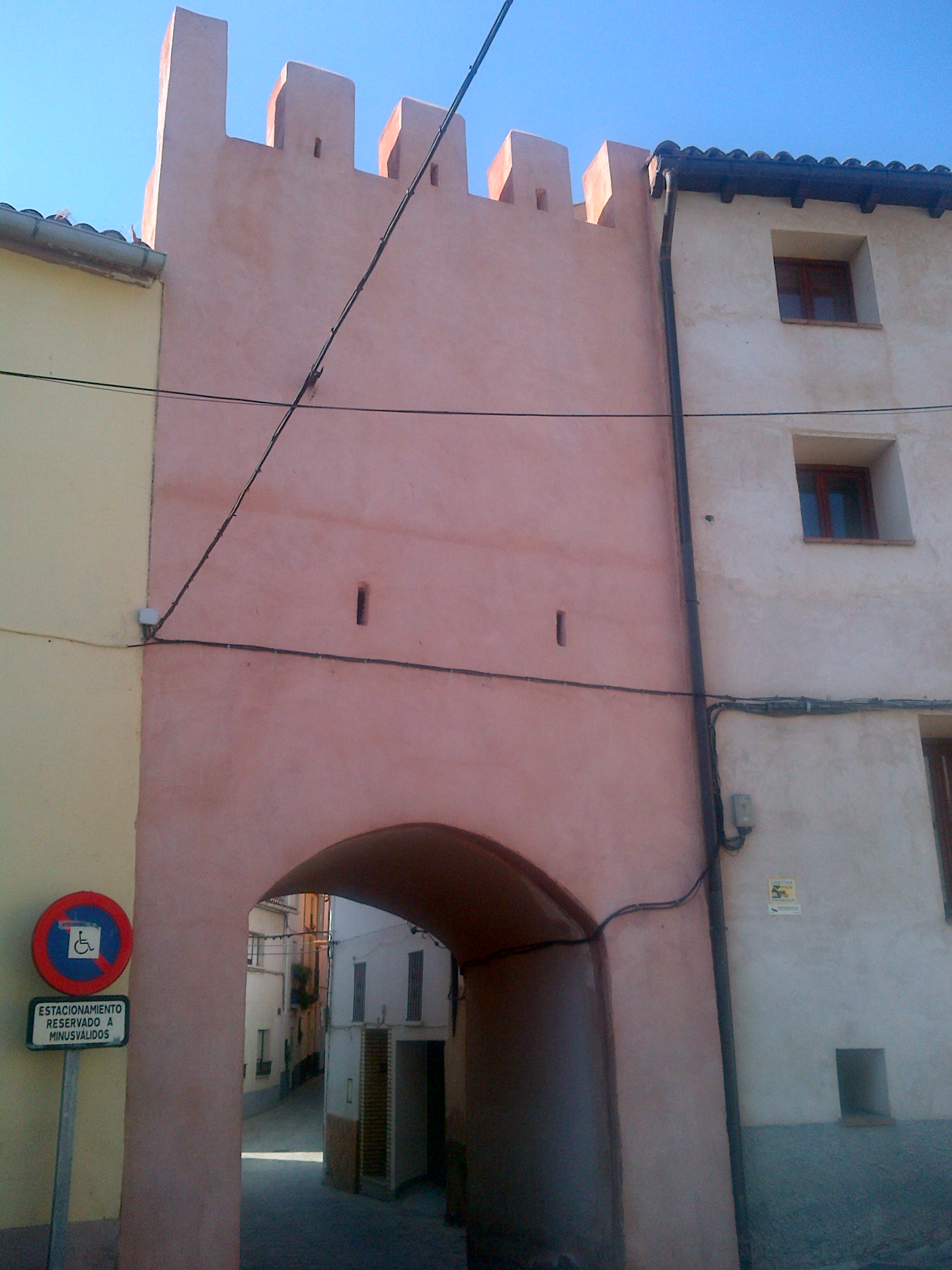 Arco-capilla de San Miguel de Atecavisto desde el exterior de la villa